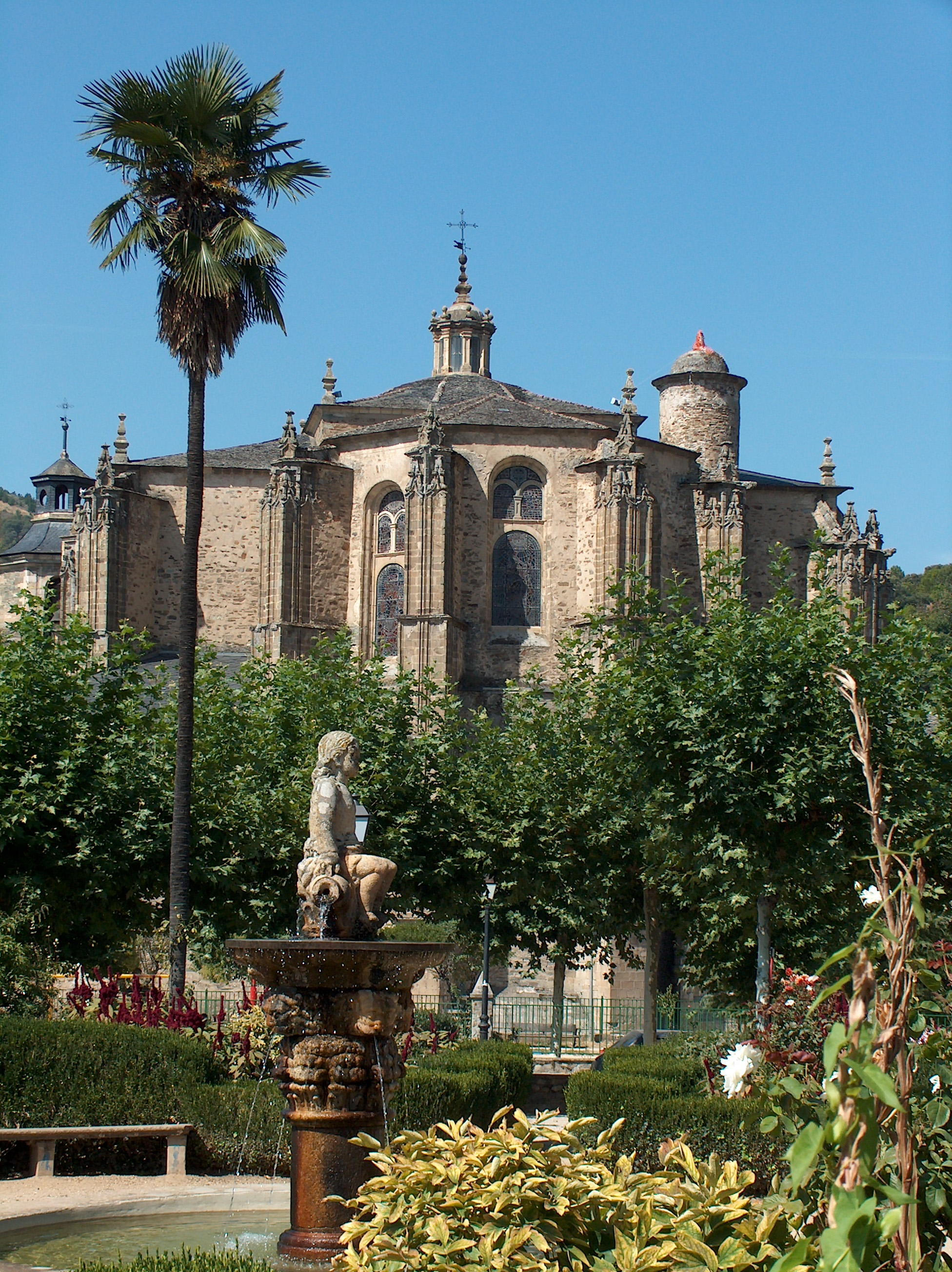 Colegiata de Santa María de Cluny